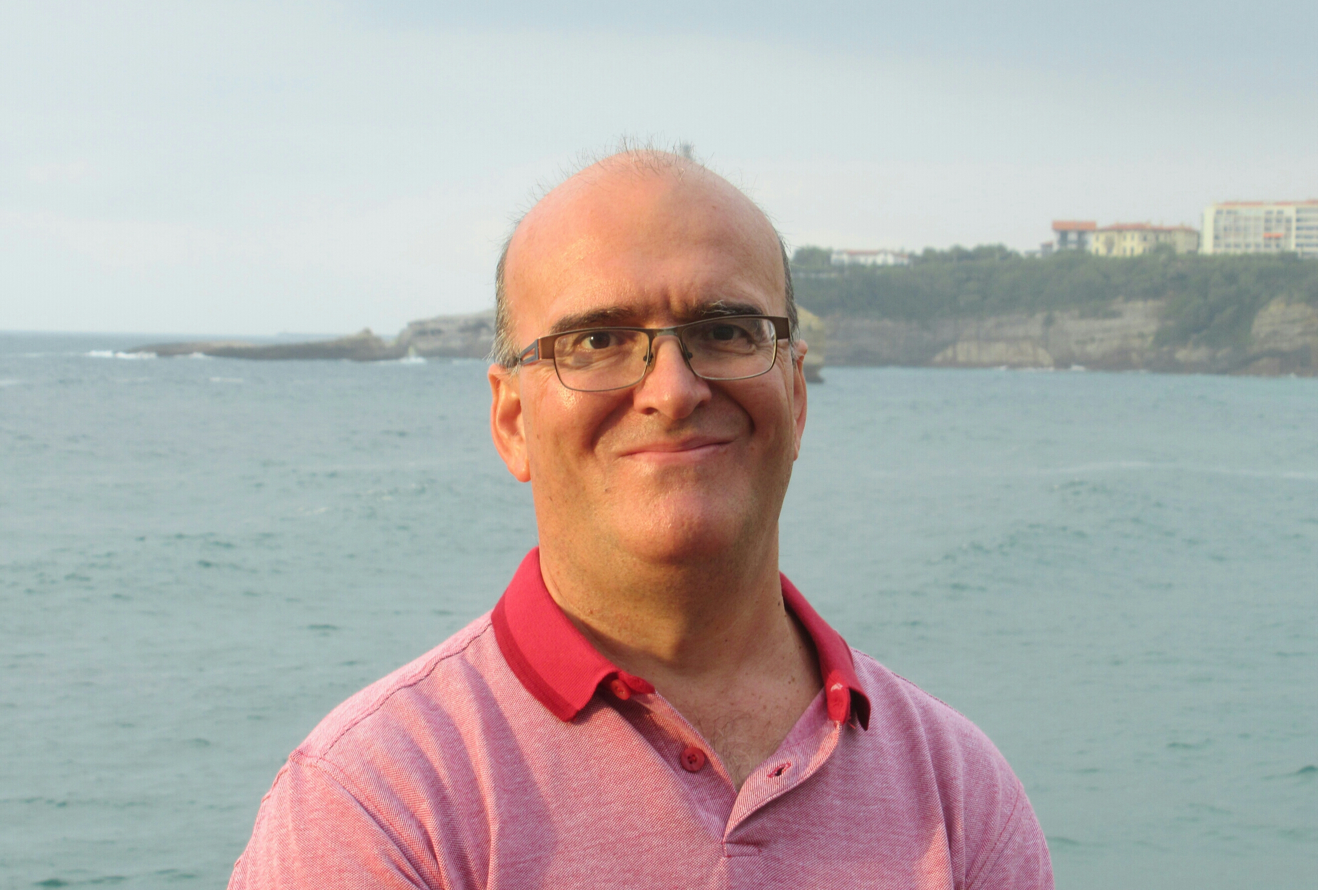 Aingeru Epaltza idazlea. Argazkia: Elena Ronkal.